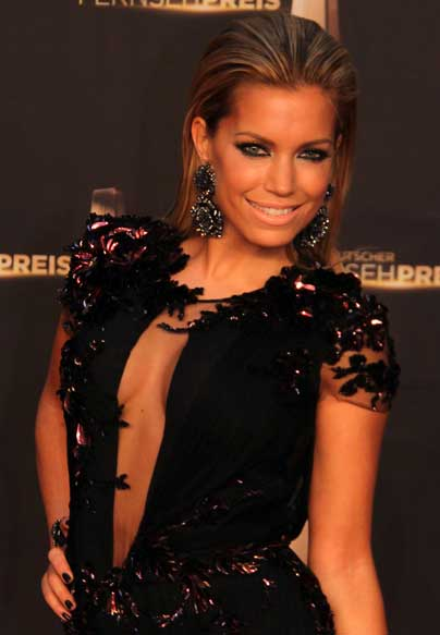 Sylvie van der Vaart beim Deutschen Fernsehpreis 2012